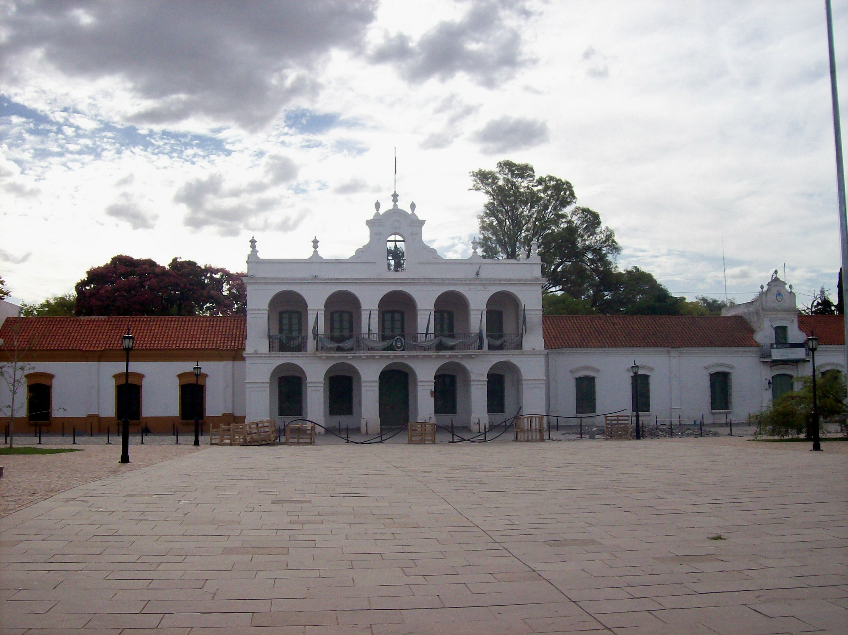 Fachada del Cabildo y Museo Histórico Enrique Udaondo de Luján, provincia de Buenos Aires. Argentina